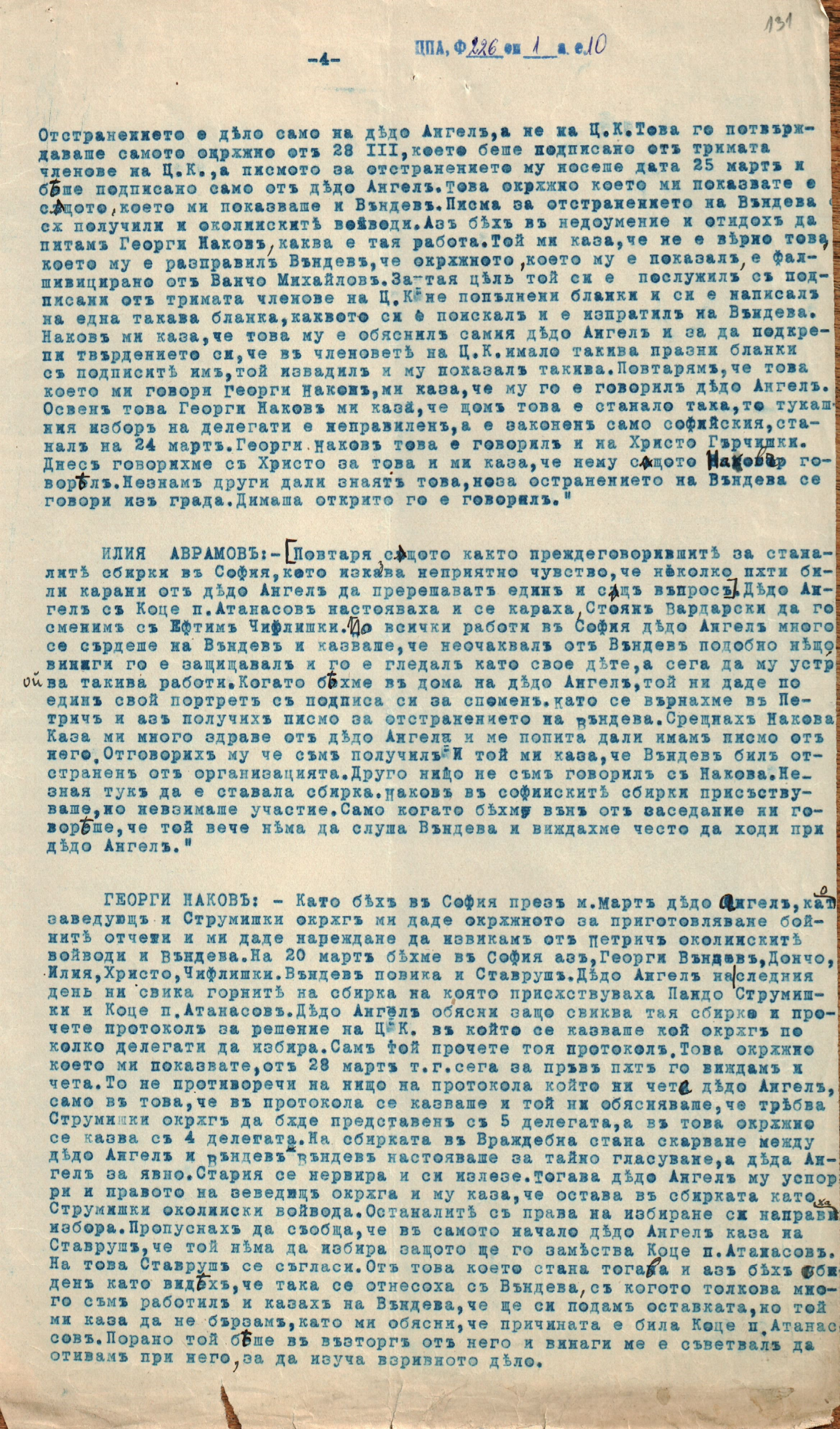 Доклади, изложения, декларации, писма и др. на ВМРО за организационното състояние, характера и дейността на организацията